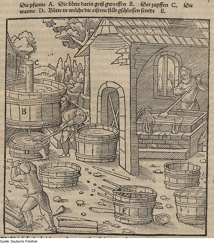 Original image description from the Deutsche Fotothek Bergwerk & Bergbau & Salpetergewinnung & Salpeter